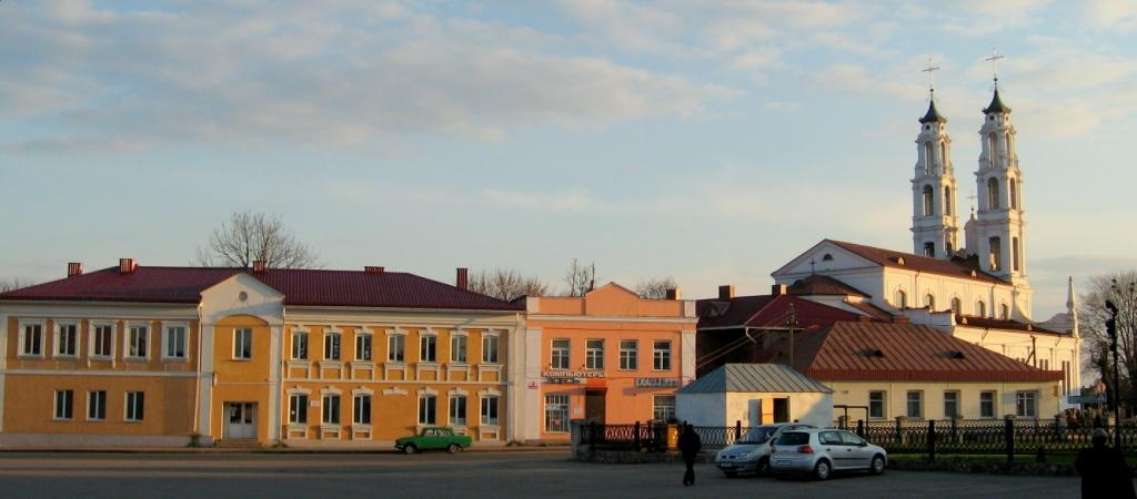 г.Ошмяны: костел Св. Михаила Архангела и рядовая застройка